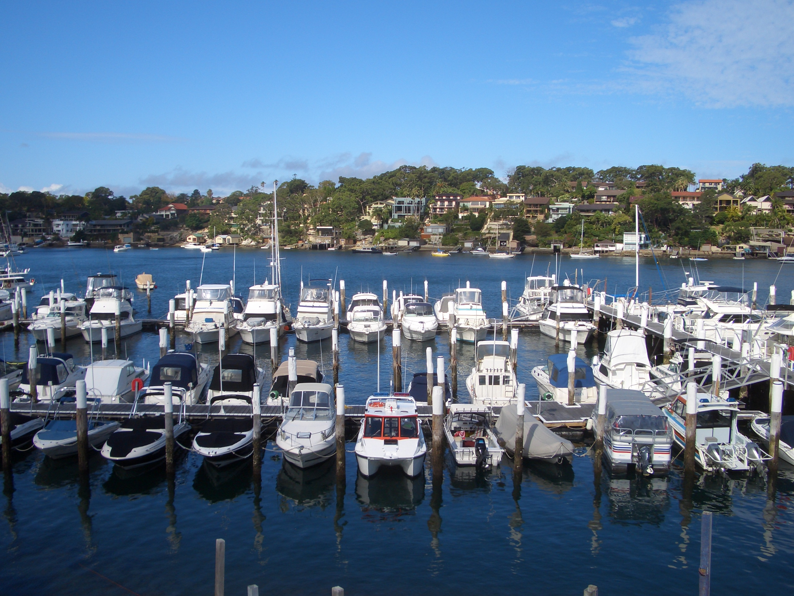 Burraneer Bay marina